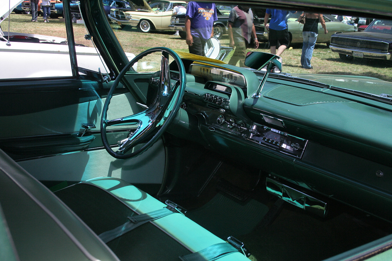 1960 Dodge Dart Pioneer 2d sdn - green - int3